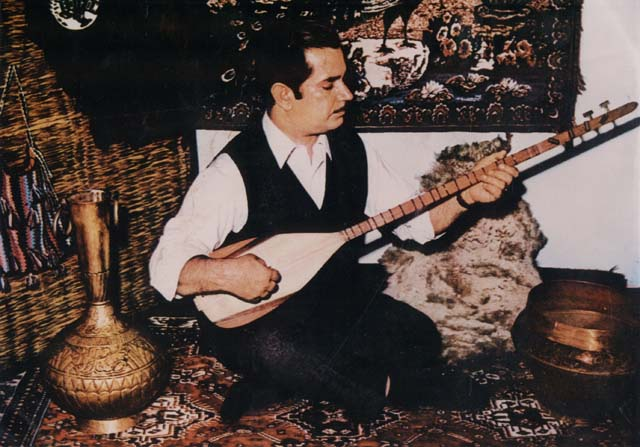 Resmin sahibi (Aşık Daimi'nin ailesi) tarafından eklenmiştir.